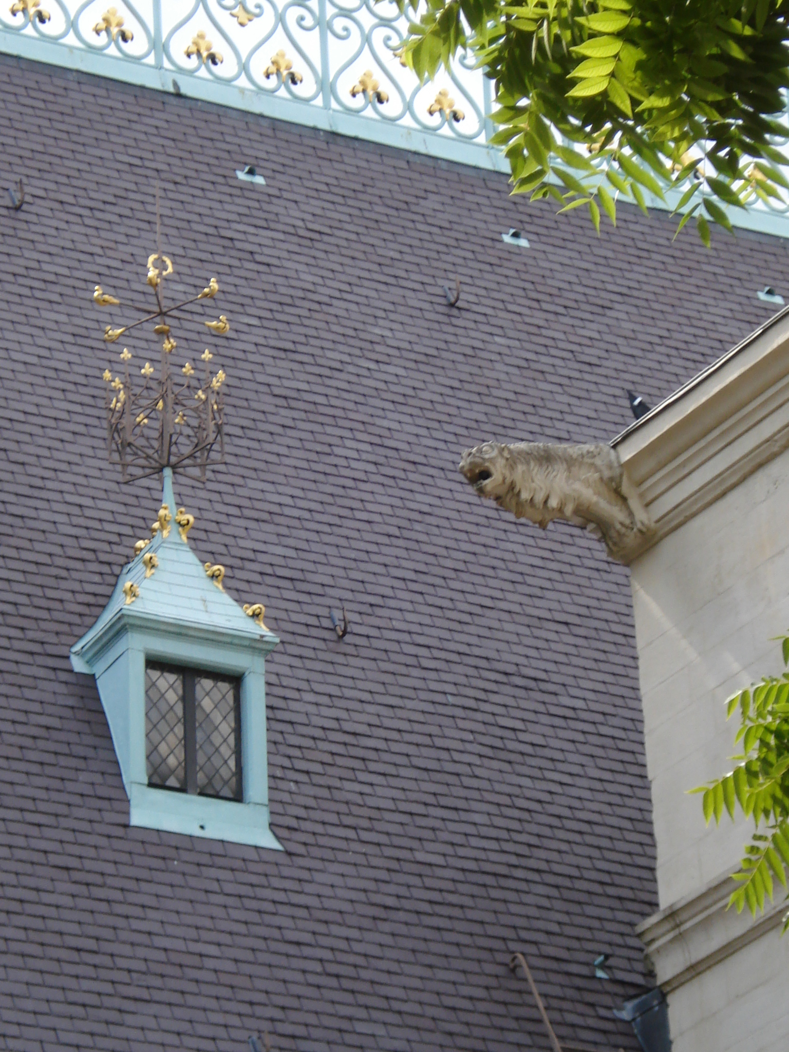 Détail de la toiture du palais ducal de Nancy